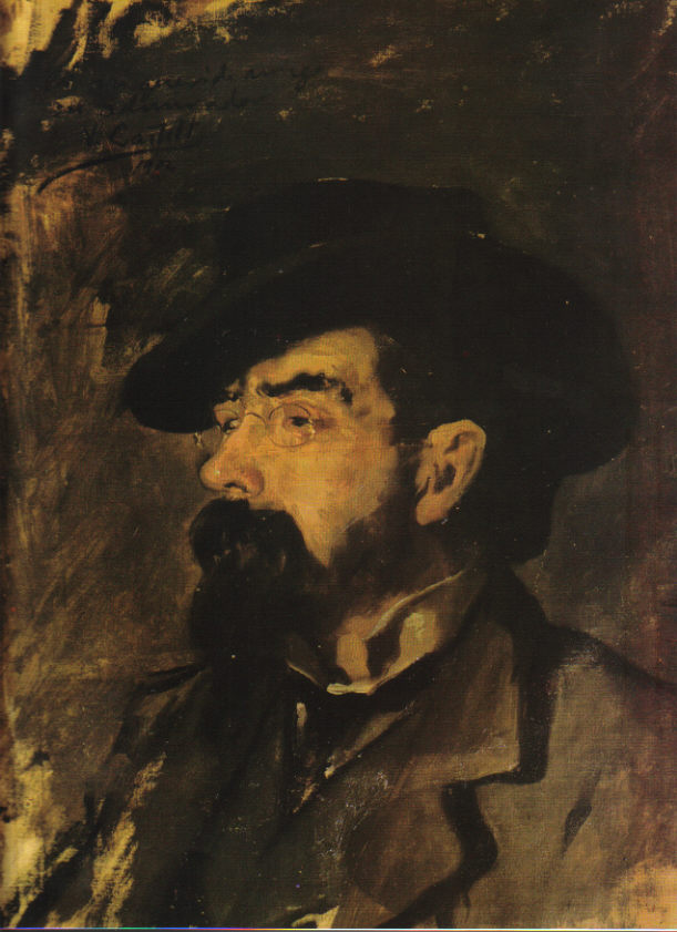 Vicente Castell, Retrato de Tárrega. Oleo sobre lienzo. Ayuntamiento de Vila-real.